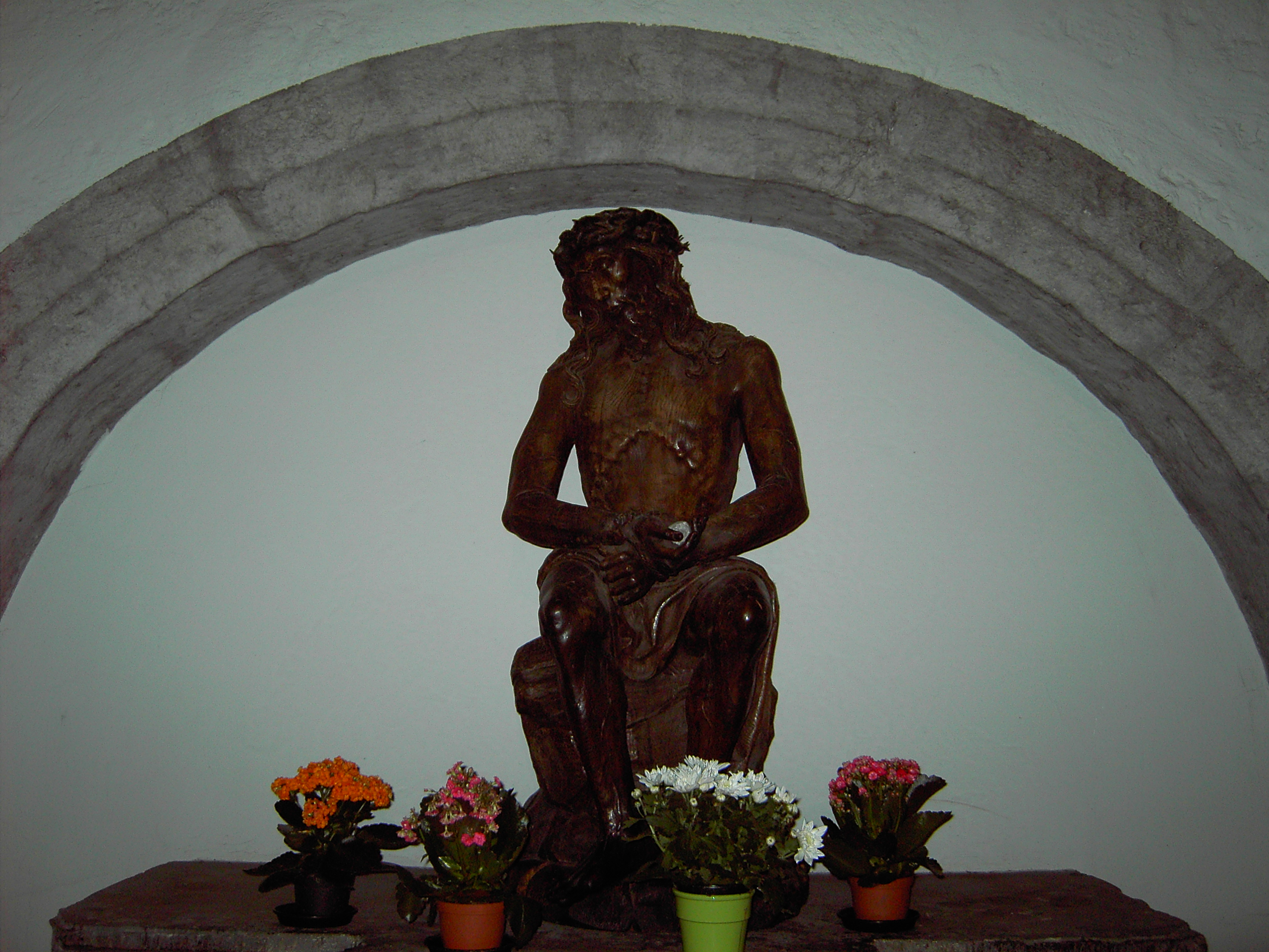 Figur Ecce Homo in der Aachener Kirche St. Foillan